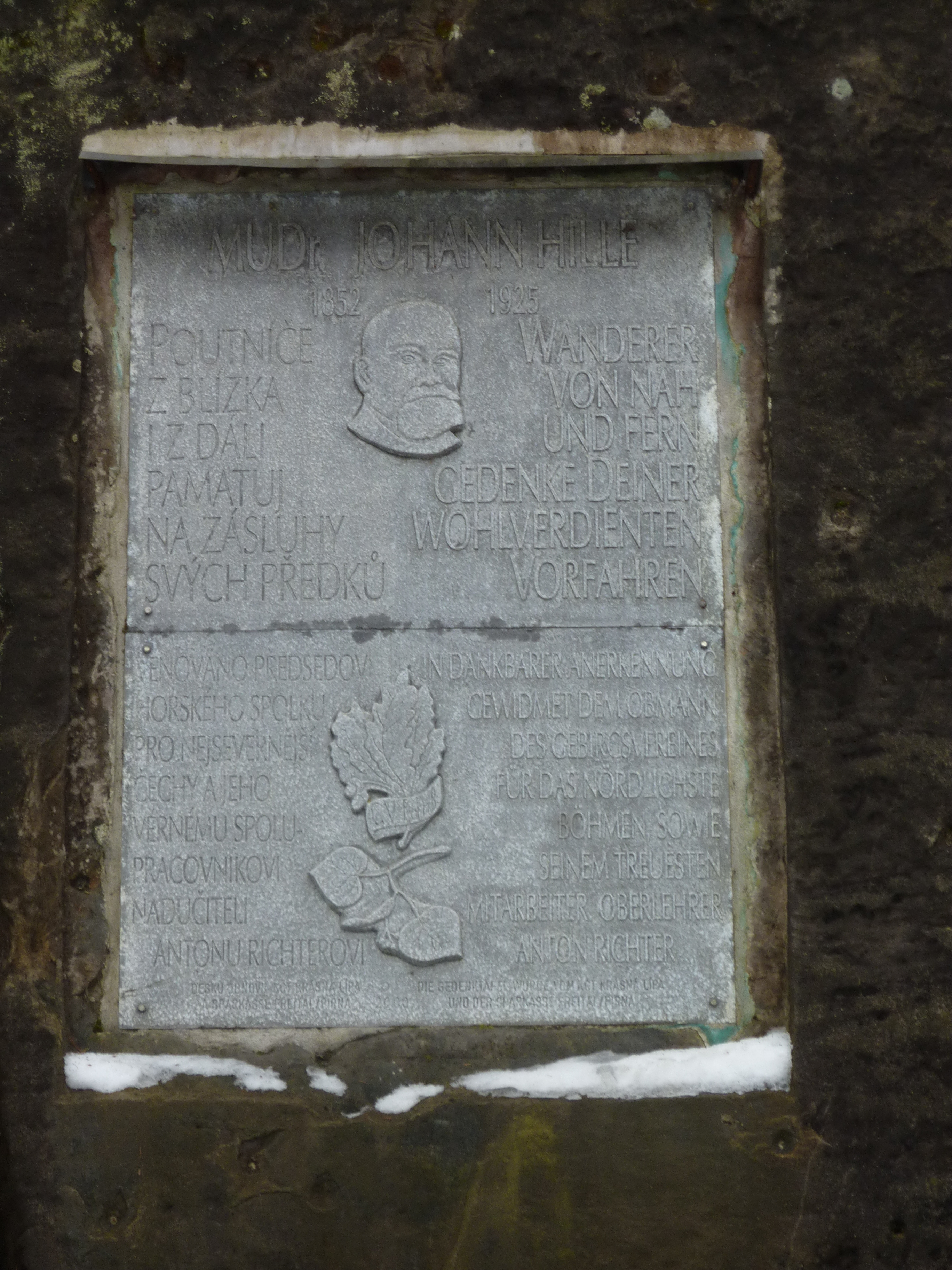 inscription: Poutníče z blízka i z dáli, pamatuj na zásluhy svých předků